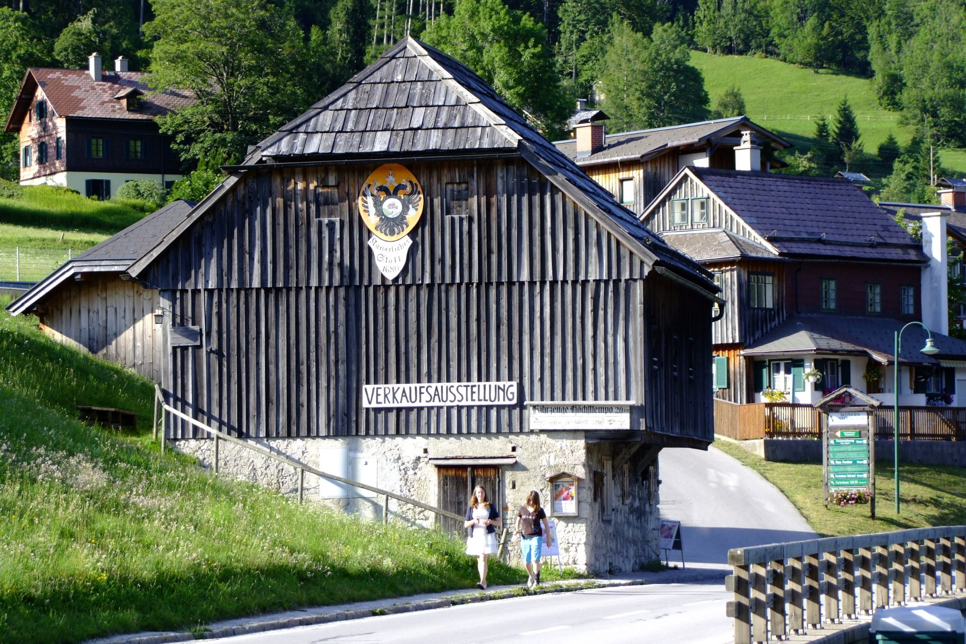 Ehem. Kaiserlicher Stall